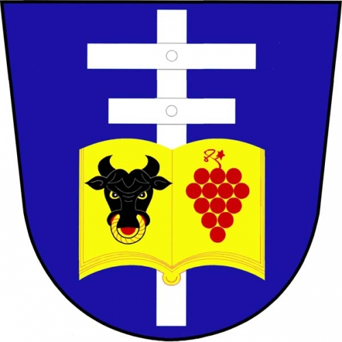 znak, Kadov, okres Znojmo